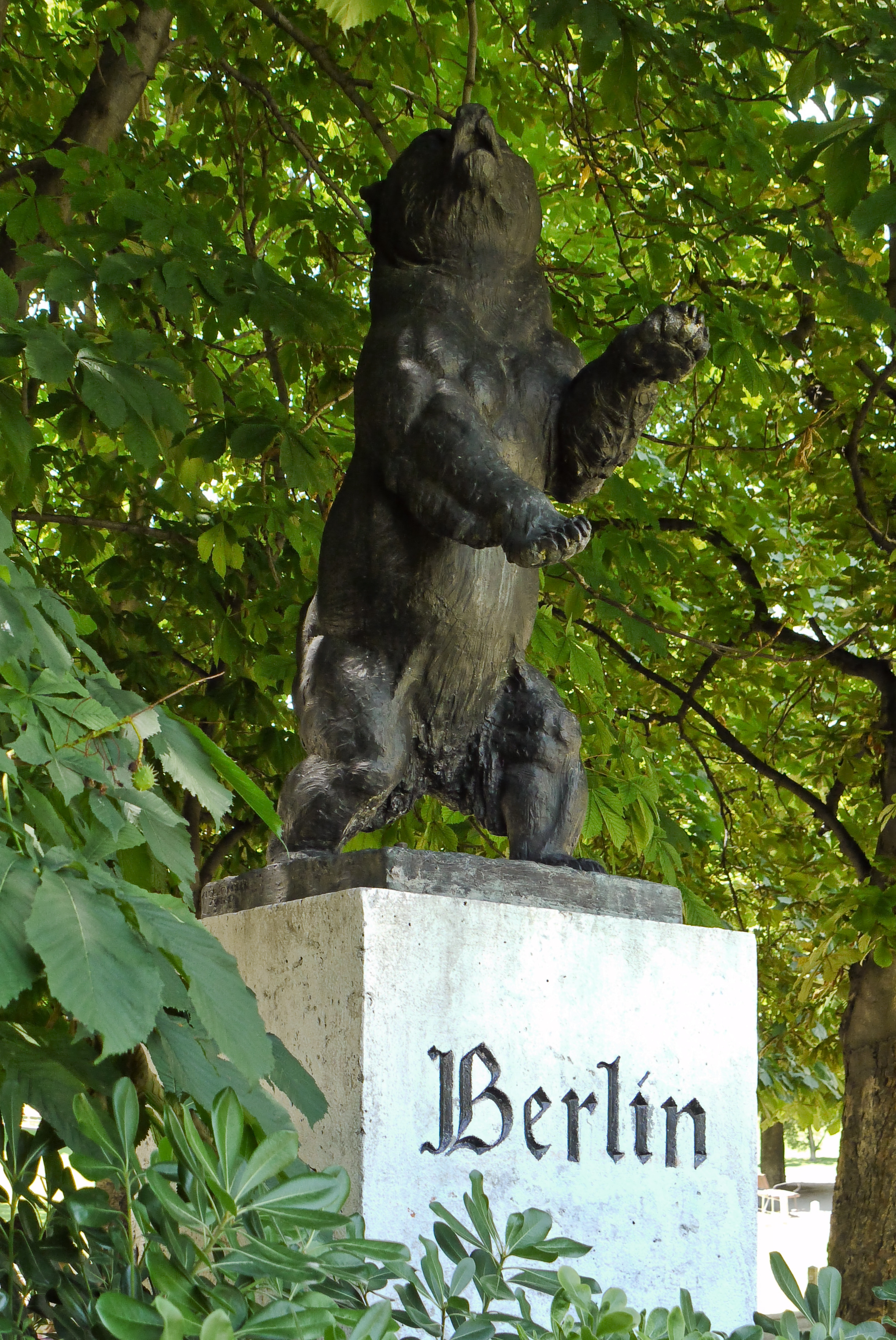 Parque de Berlín, Madrid. Oso de Berlin. Madrid, España.